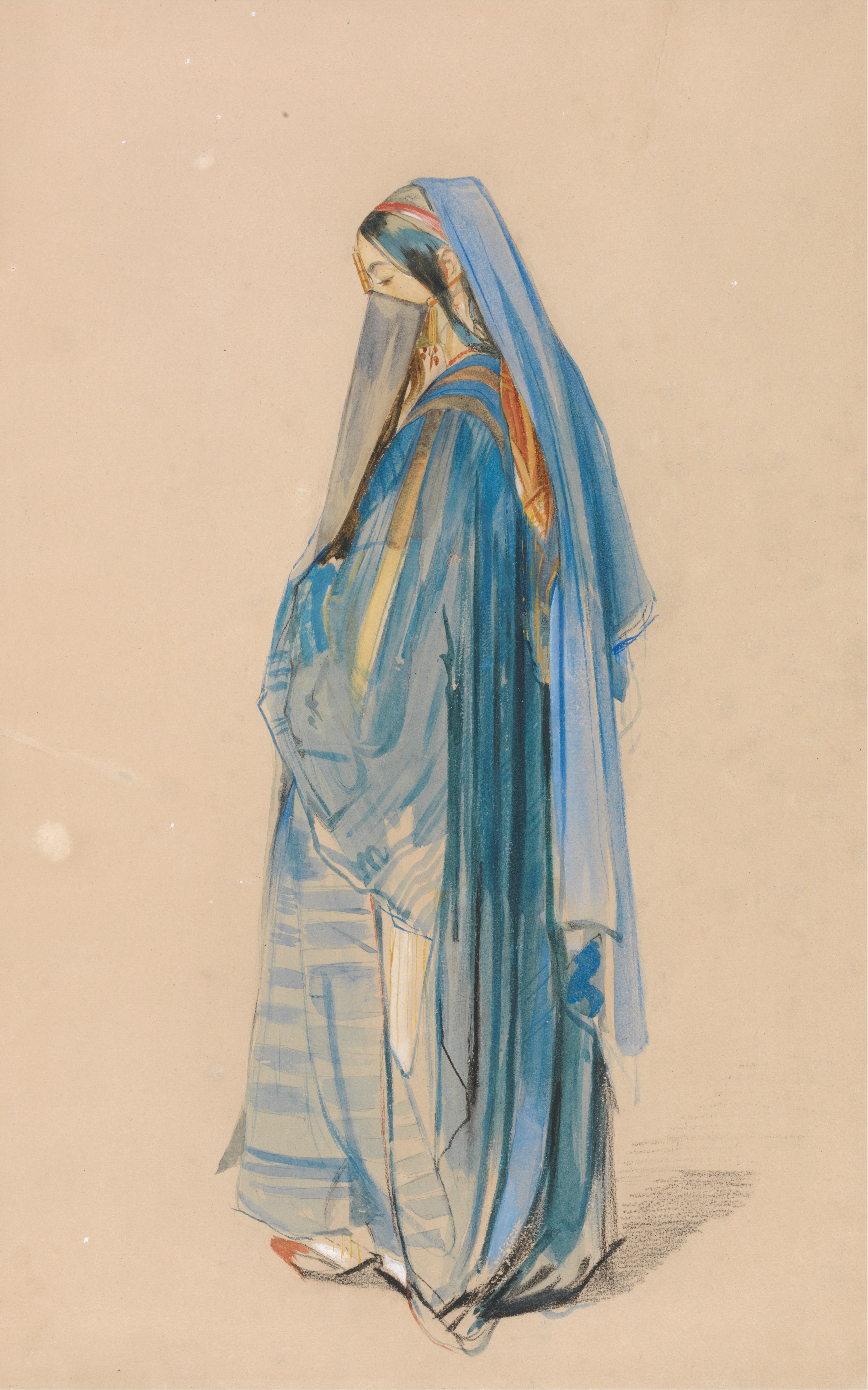 Portrait